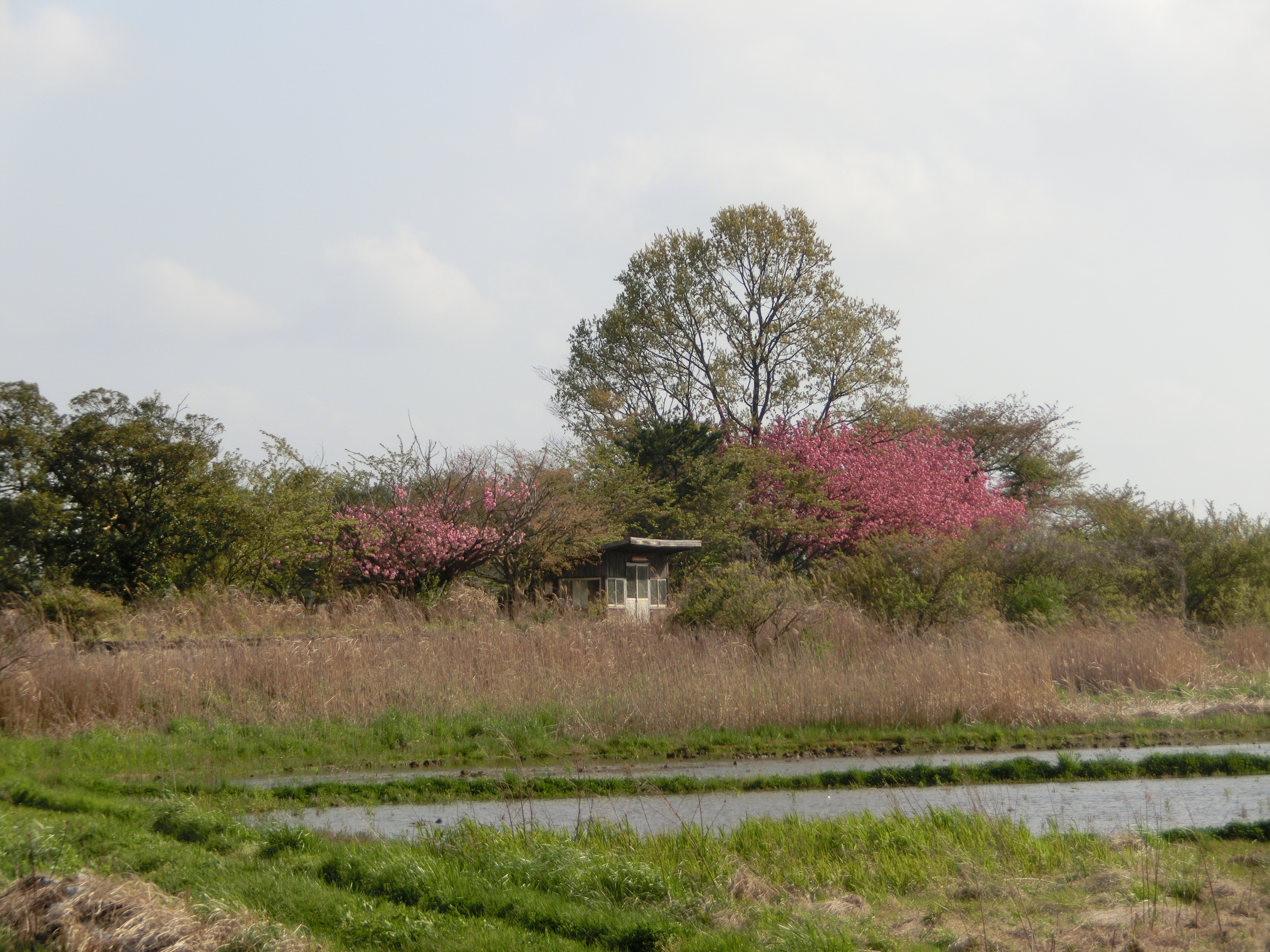 廃止後の前波駅ホーム全景(2017年4月)